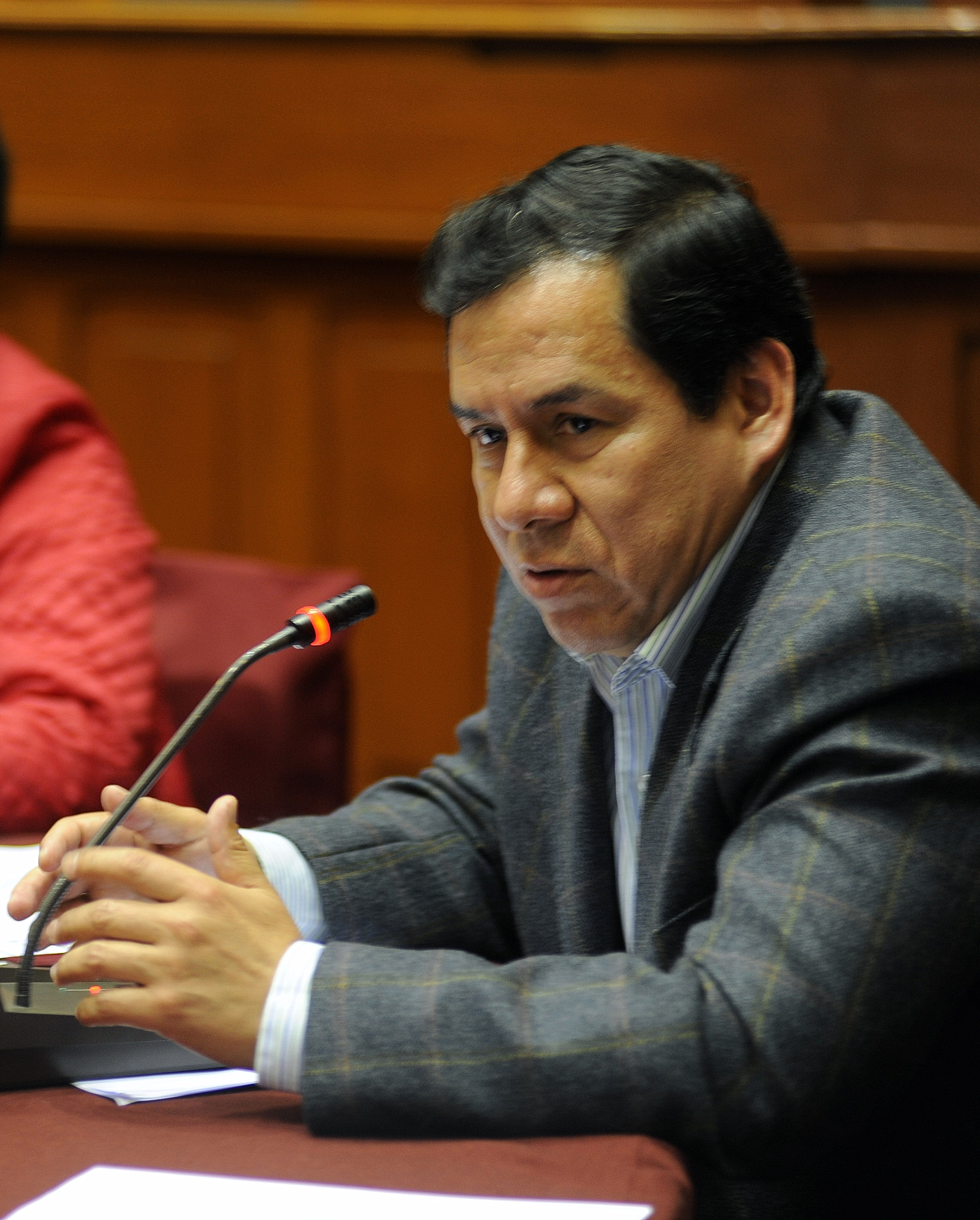 Congresista José Vega Antonio interviene en sesión realizada esta tarde por la Comisión Permanente del Congreso.